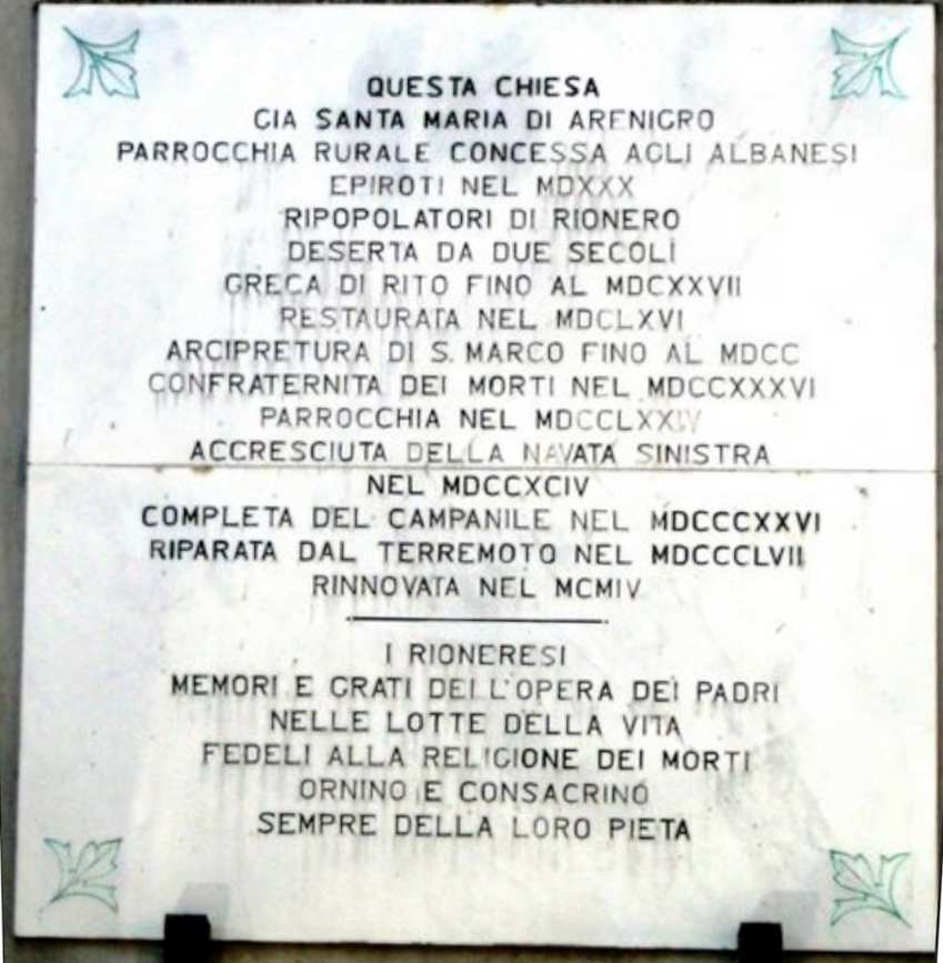 Lapide commemorativa